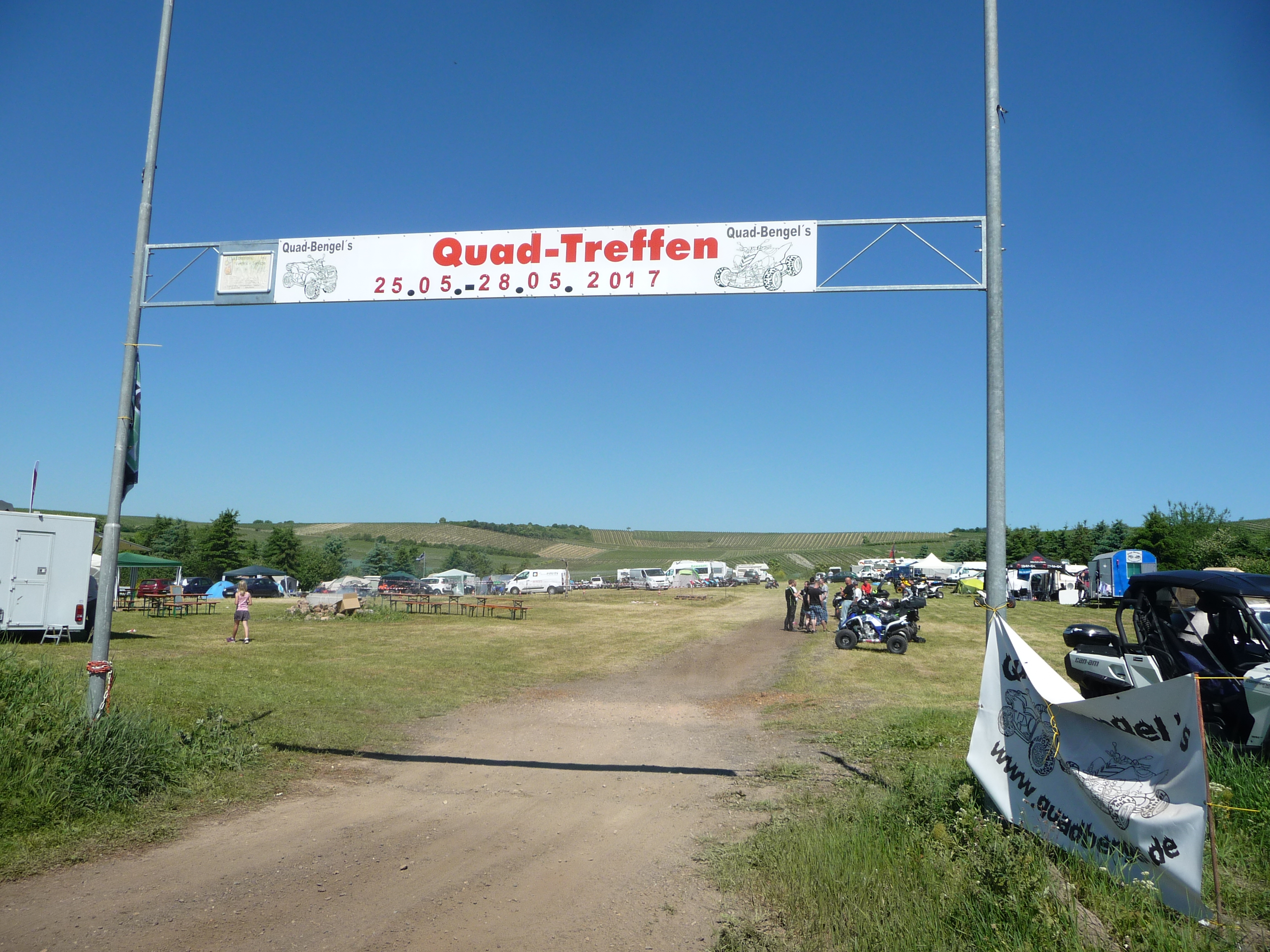 Schafhausen ist ein Stadtteil von Alzey im rheinland-pfälzischen Landkreis Alzey-Worms.